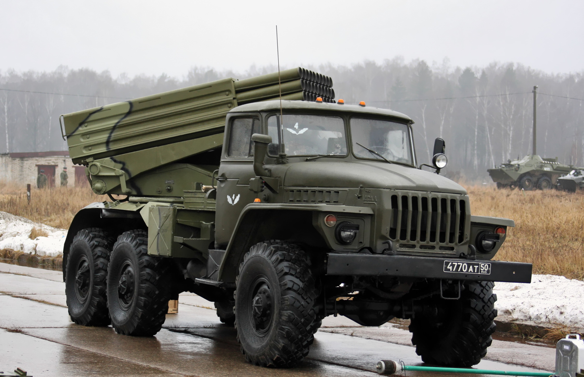 Батарея БМ-21 РСЗО Град из состава реактивного артиллерийского дивизиона бригады (Exercises with BM-21 9K51 Grad MLRS battery)